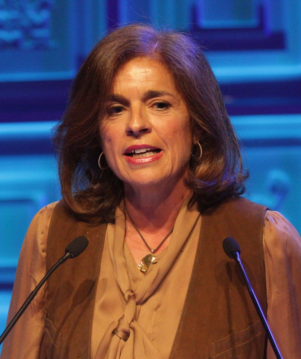 WTTC Global Summit 2015